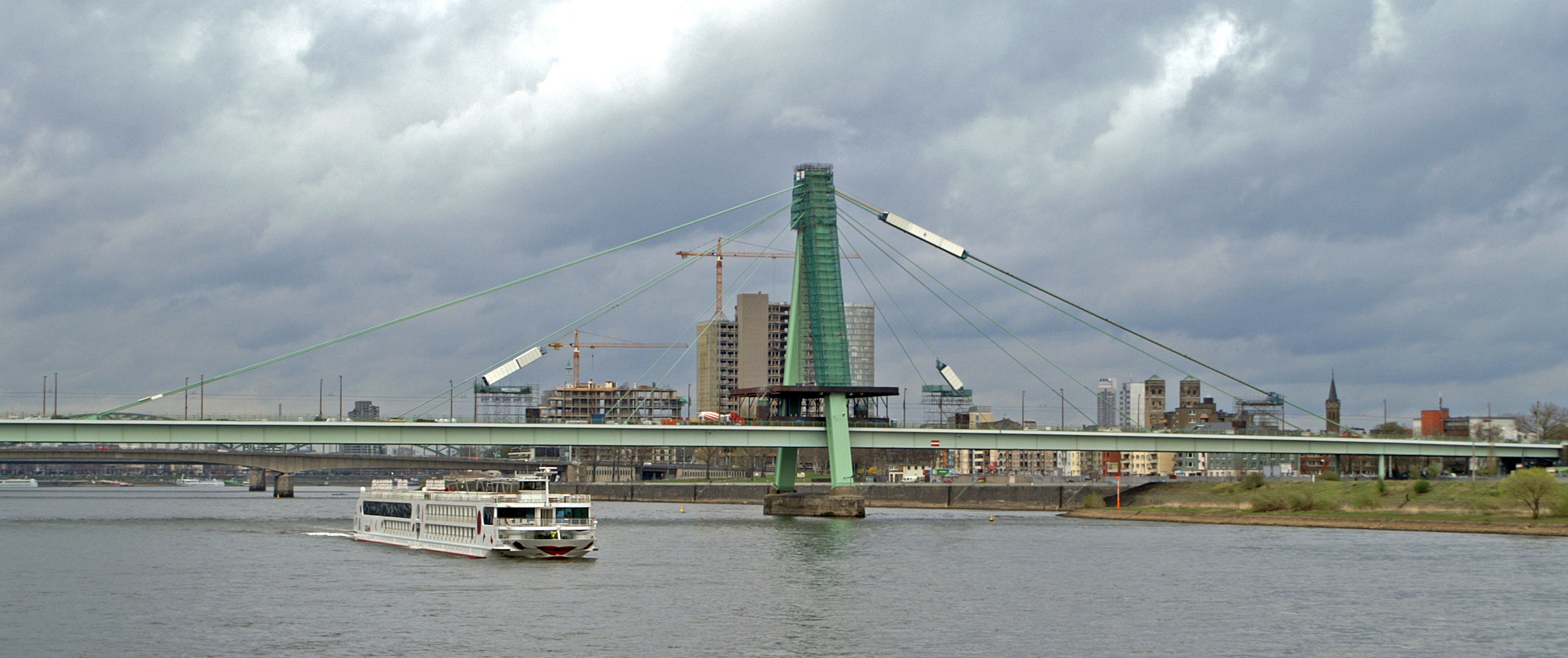 A-Rosa Viva auf Fahrt unterhalb der Severinsbrücke in Köln.